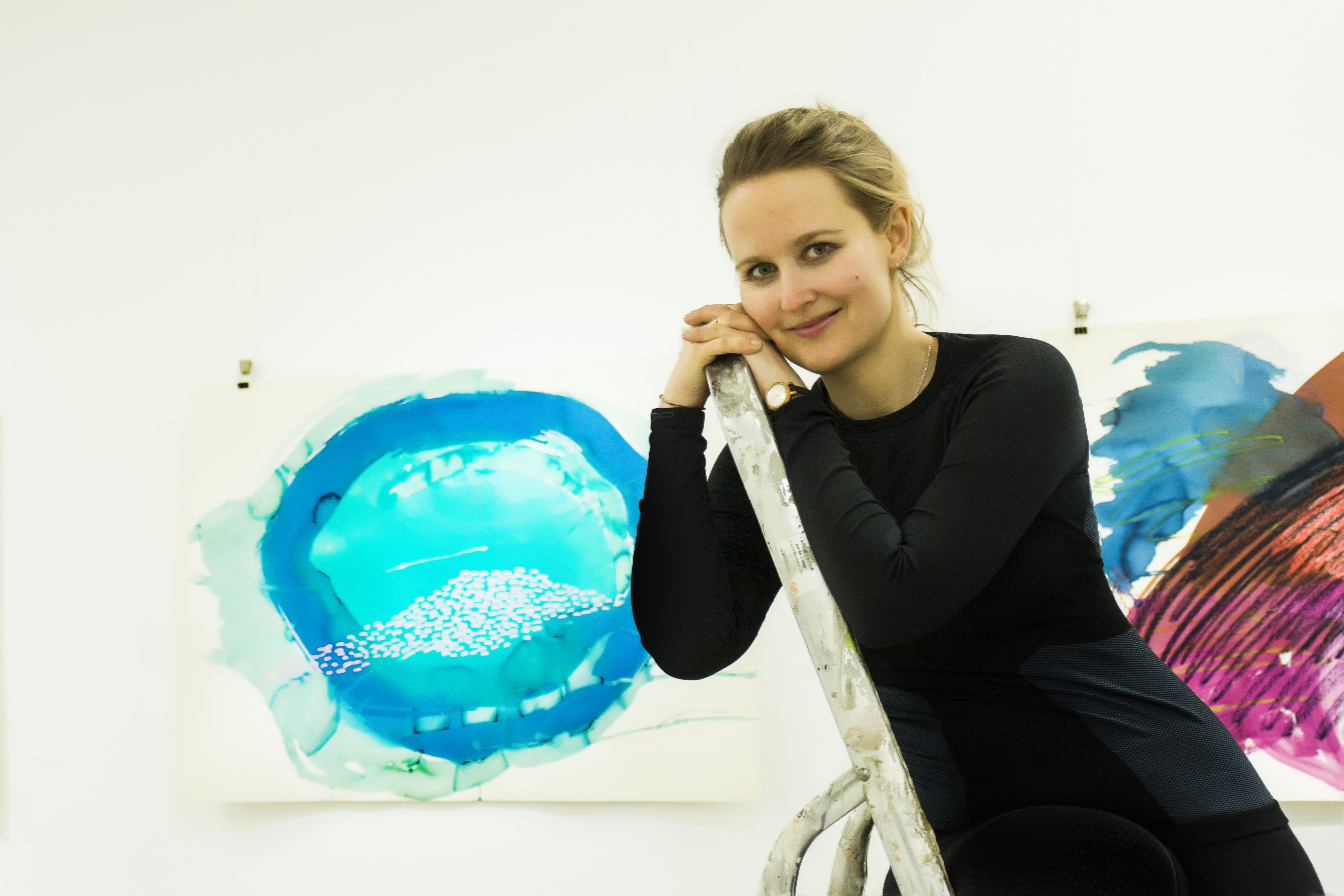 Autoportret Gabi Buzek wykonany w czasie przygotowań do wystawy pt. "Tatrzańskie powidoki"